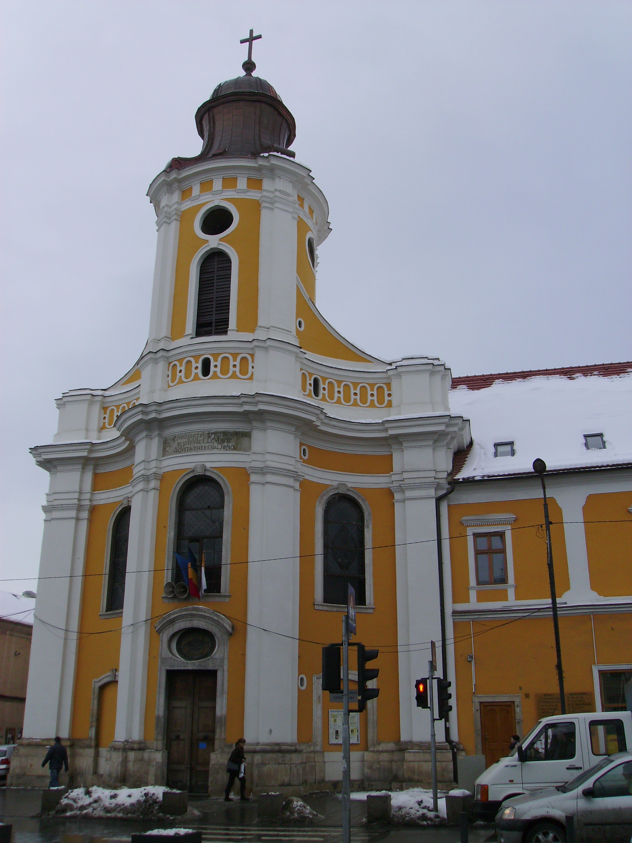 Catedrala Greco-Catolică “Schimbarea la Faţă” din Cluj-Napoca, Bulevardul Eroilor.